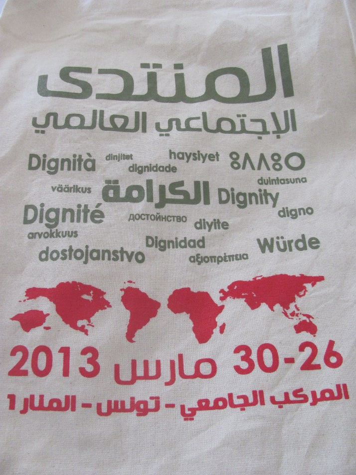 Bolsa del Foro Social Mundial Tunez 2013 bajo el Lema Dignidad